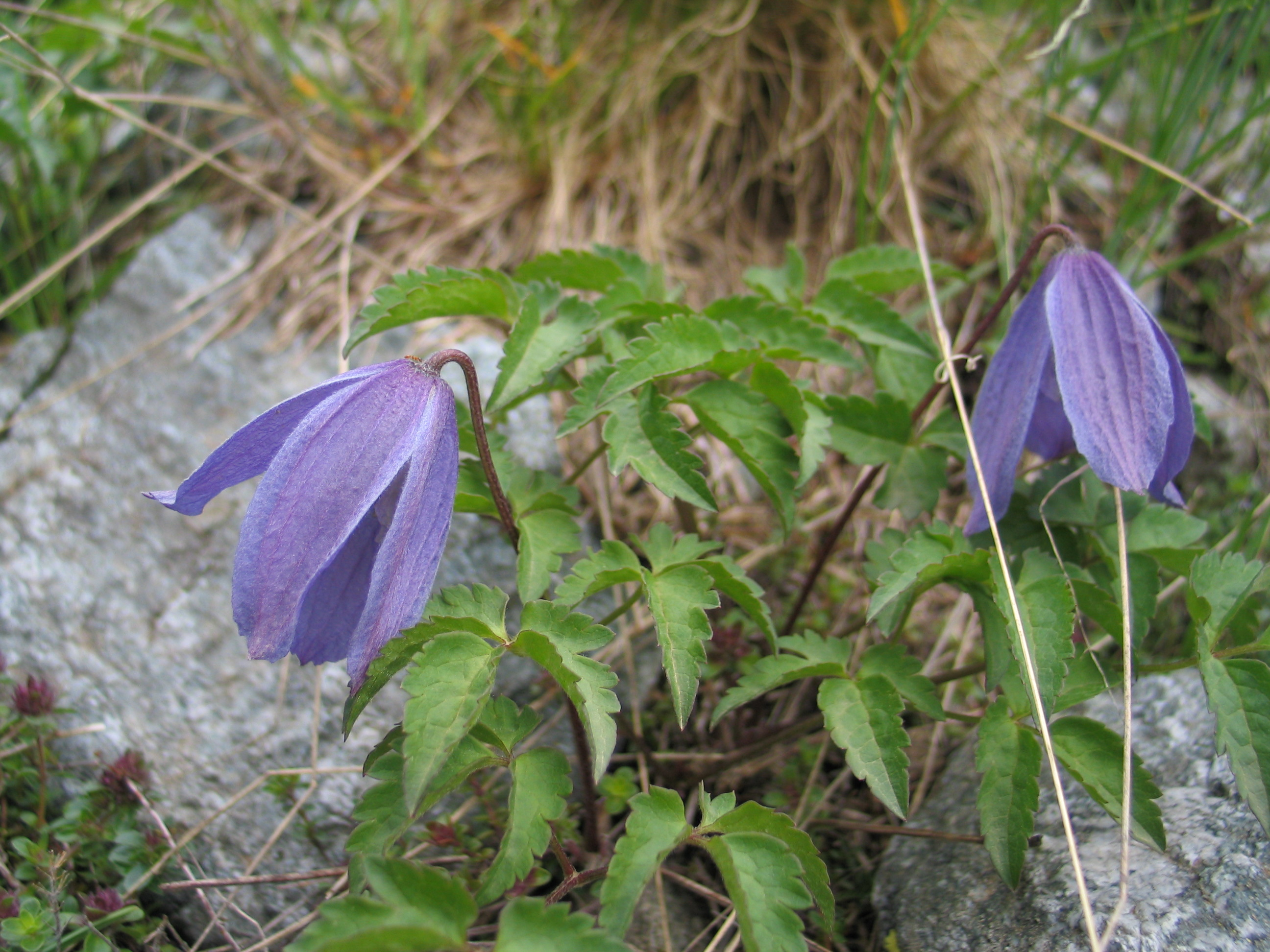 Celatis alpina